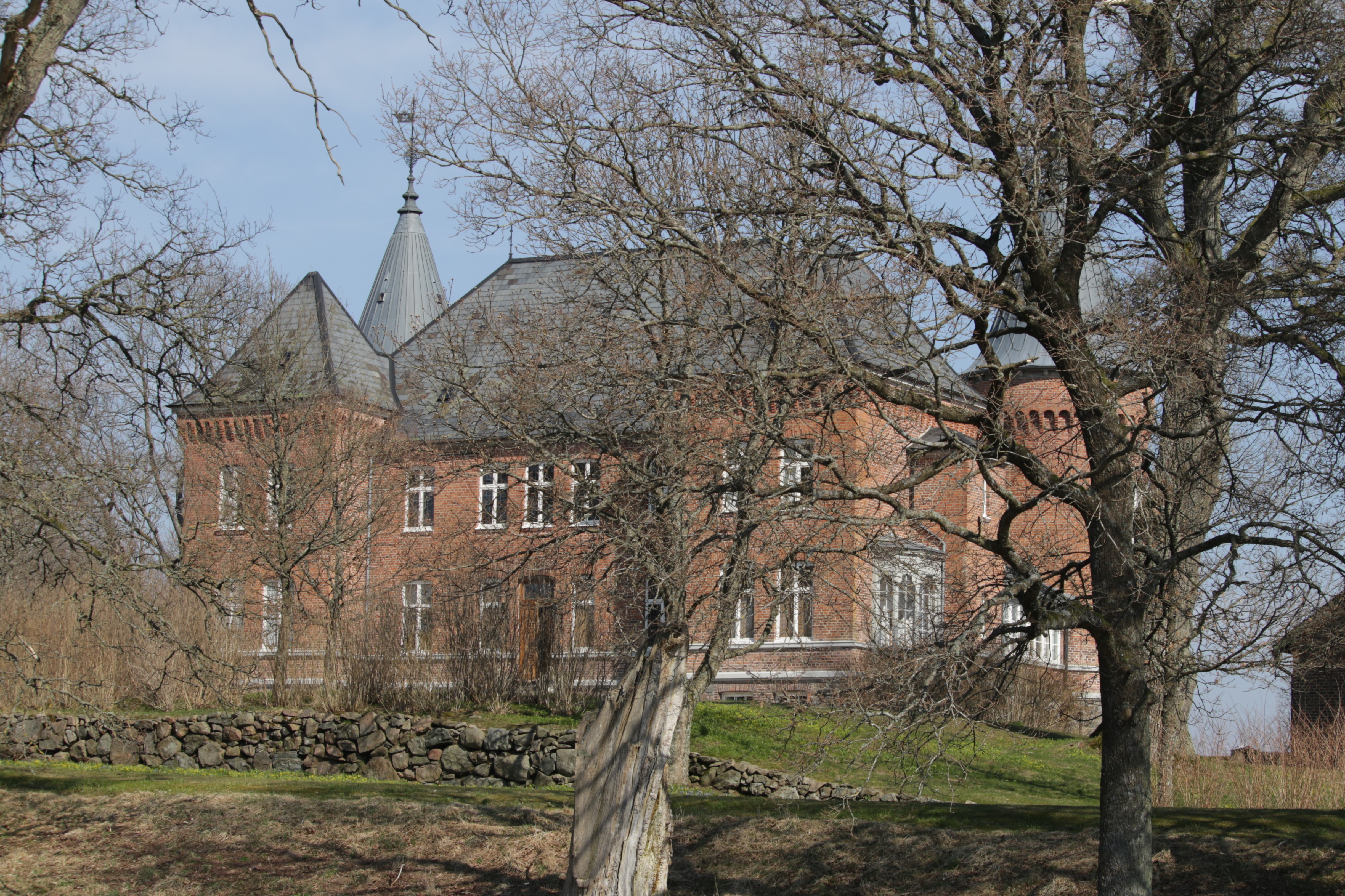 Kvesarums slott april 2018